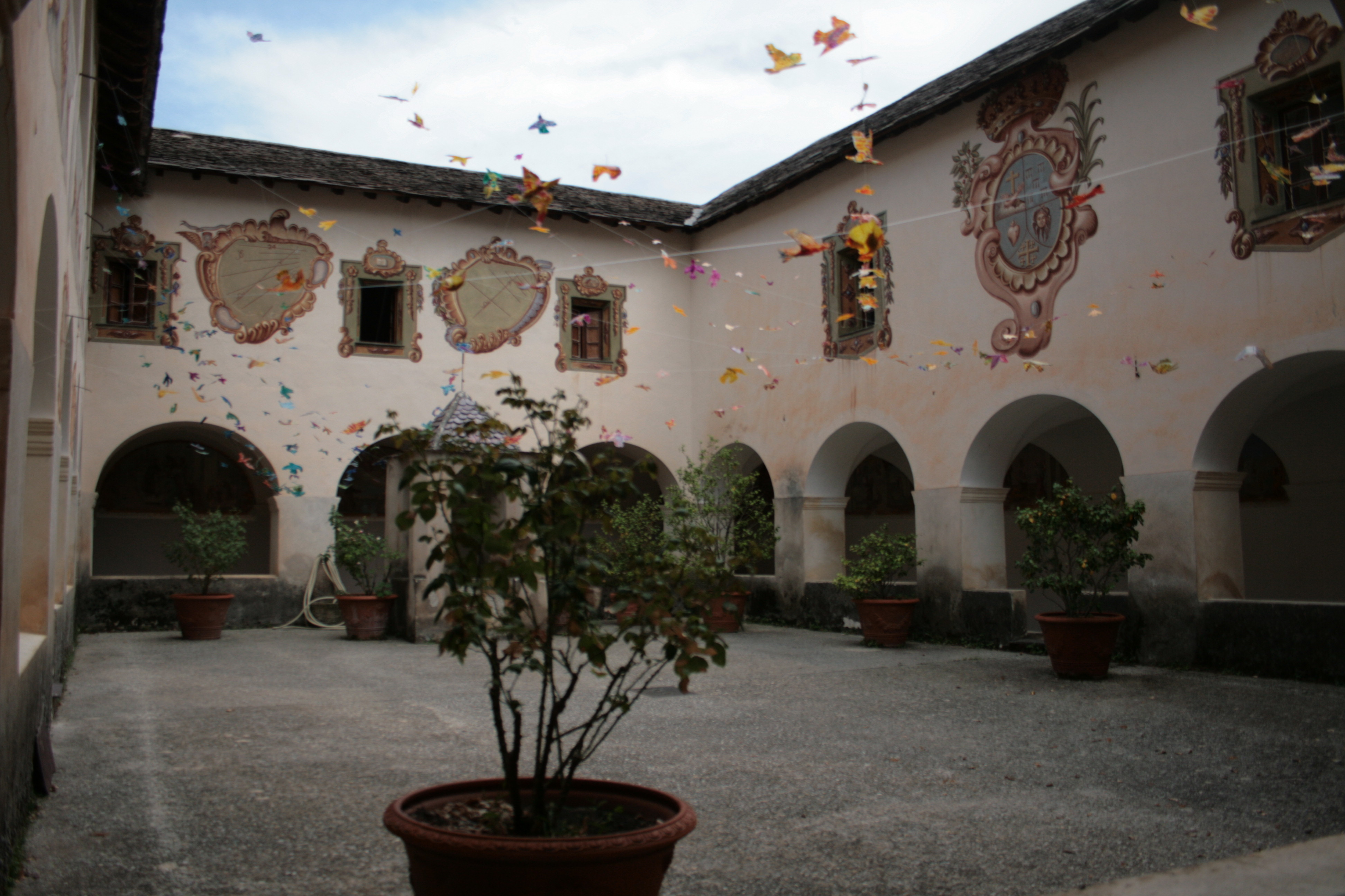 Saorge, Alpes-Maritimes, France. Monastère franciscain, le cloître du 17e siècle (fresques du 18e)